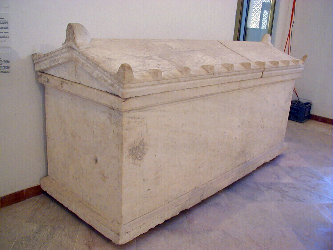 sarcophage de marbre, Carthage National Museum